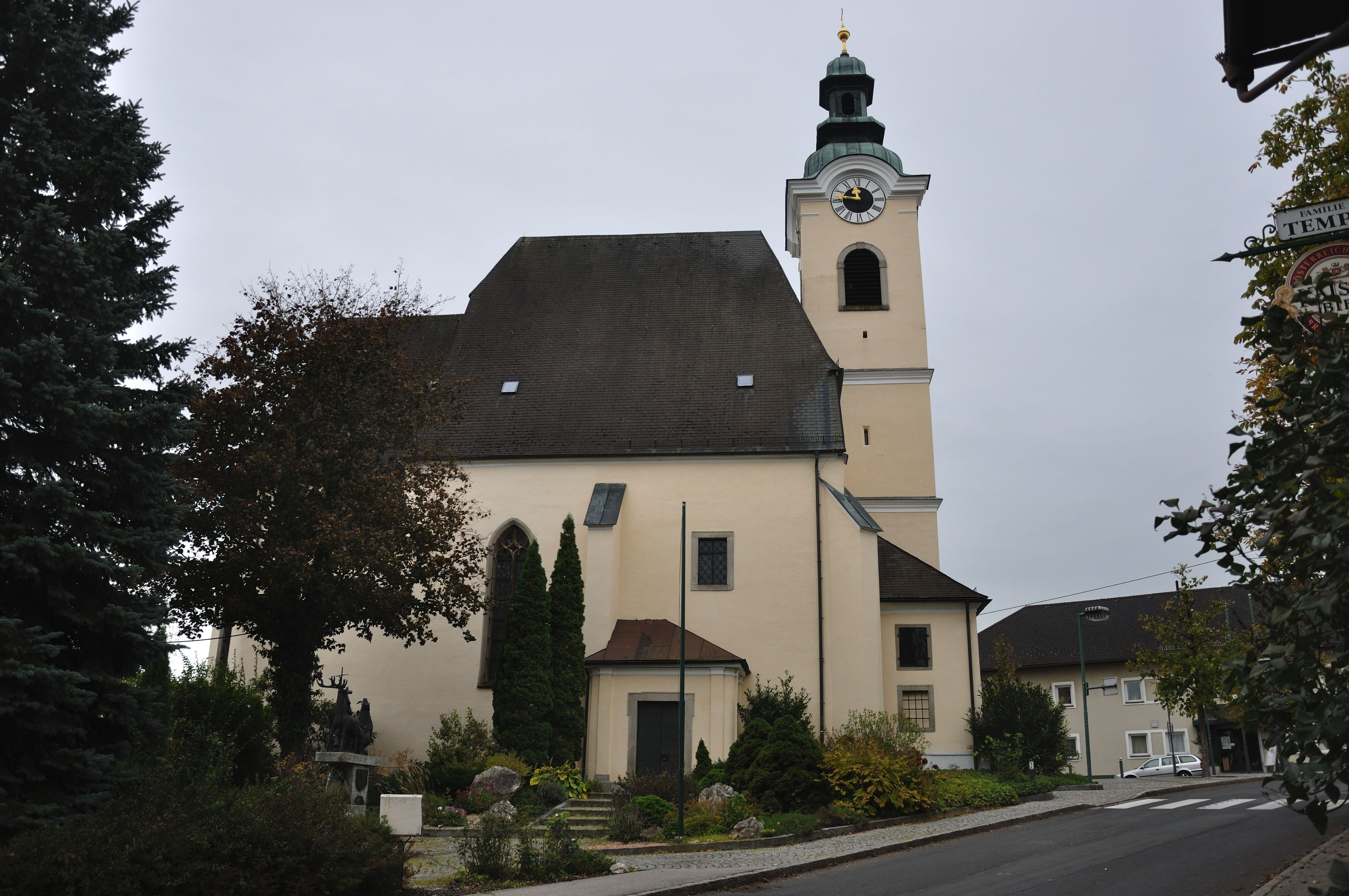 Kath. Pfarrkirche Maria Namen und ehem. Friedhof